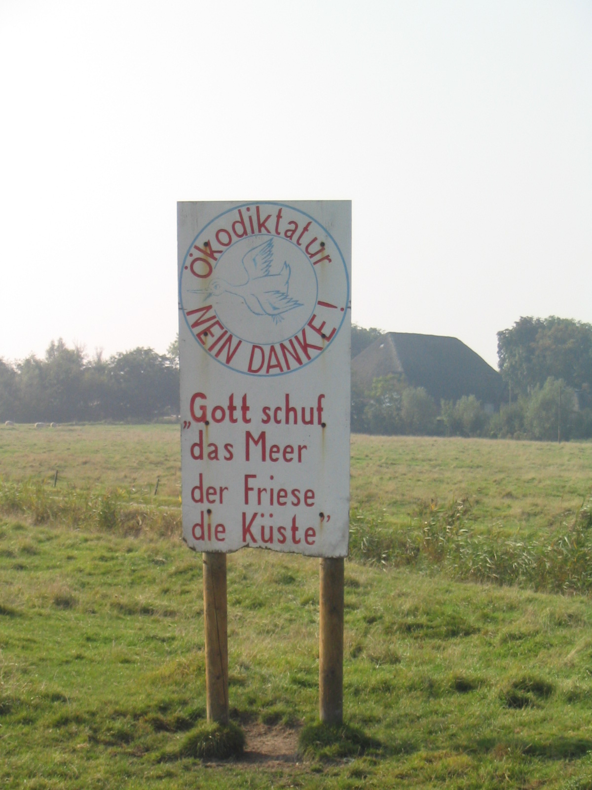 Protest sign